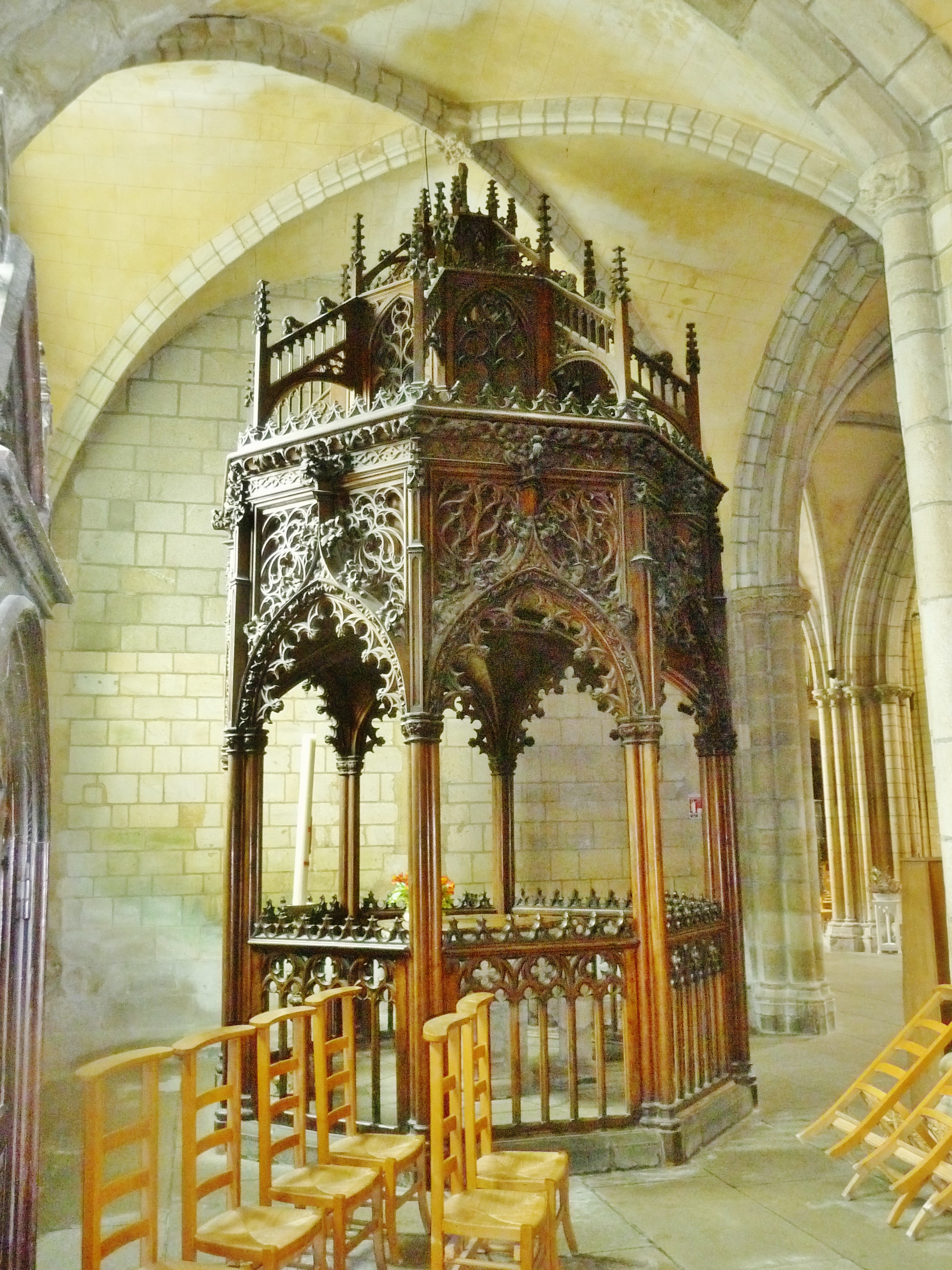 Saint-Pol-de-Léon : cathédrale Saint-Paul-Aurélien, fonts baptismaux